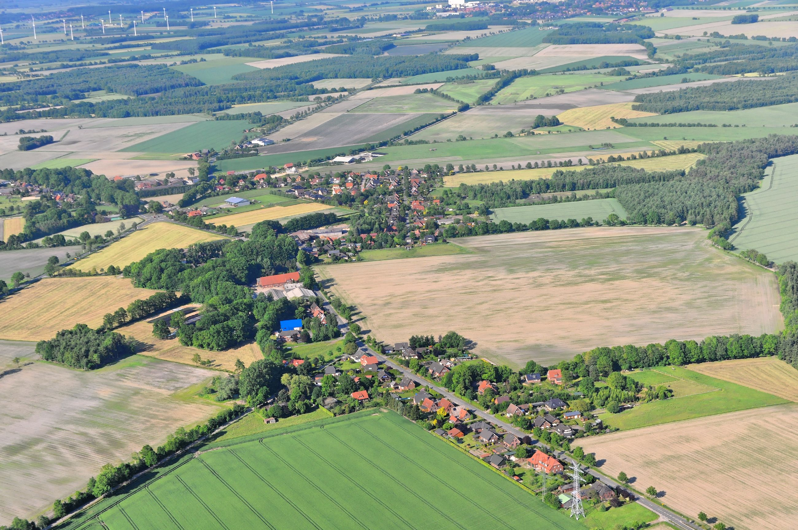 Überführungsflug vom Flugplatz Nordholz-Spieka über Lüneburg, Potsdam zum Flugplatz Schwarzheide-Schipkau